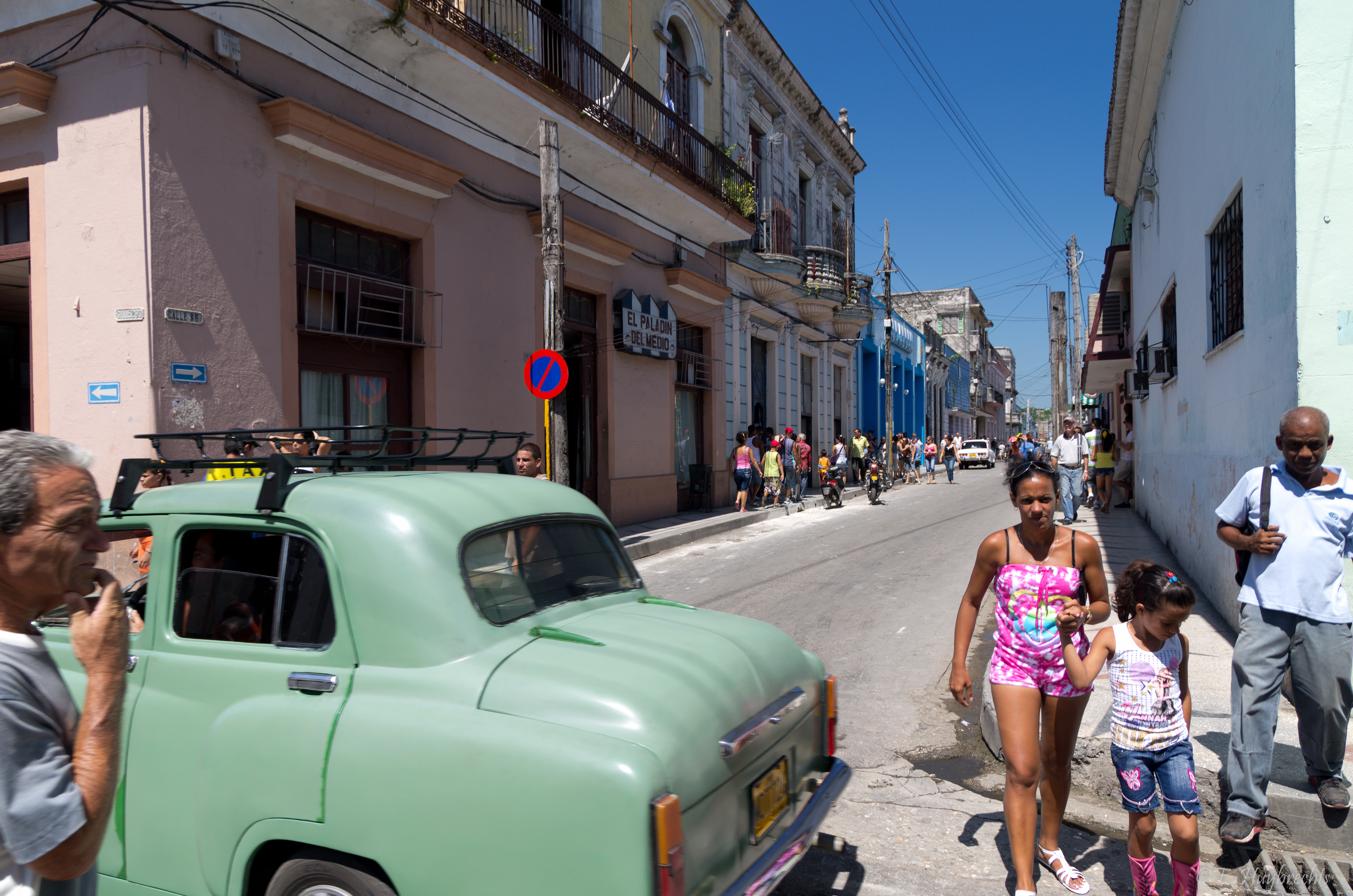 21 juillet 2011 (K5_02551)